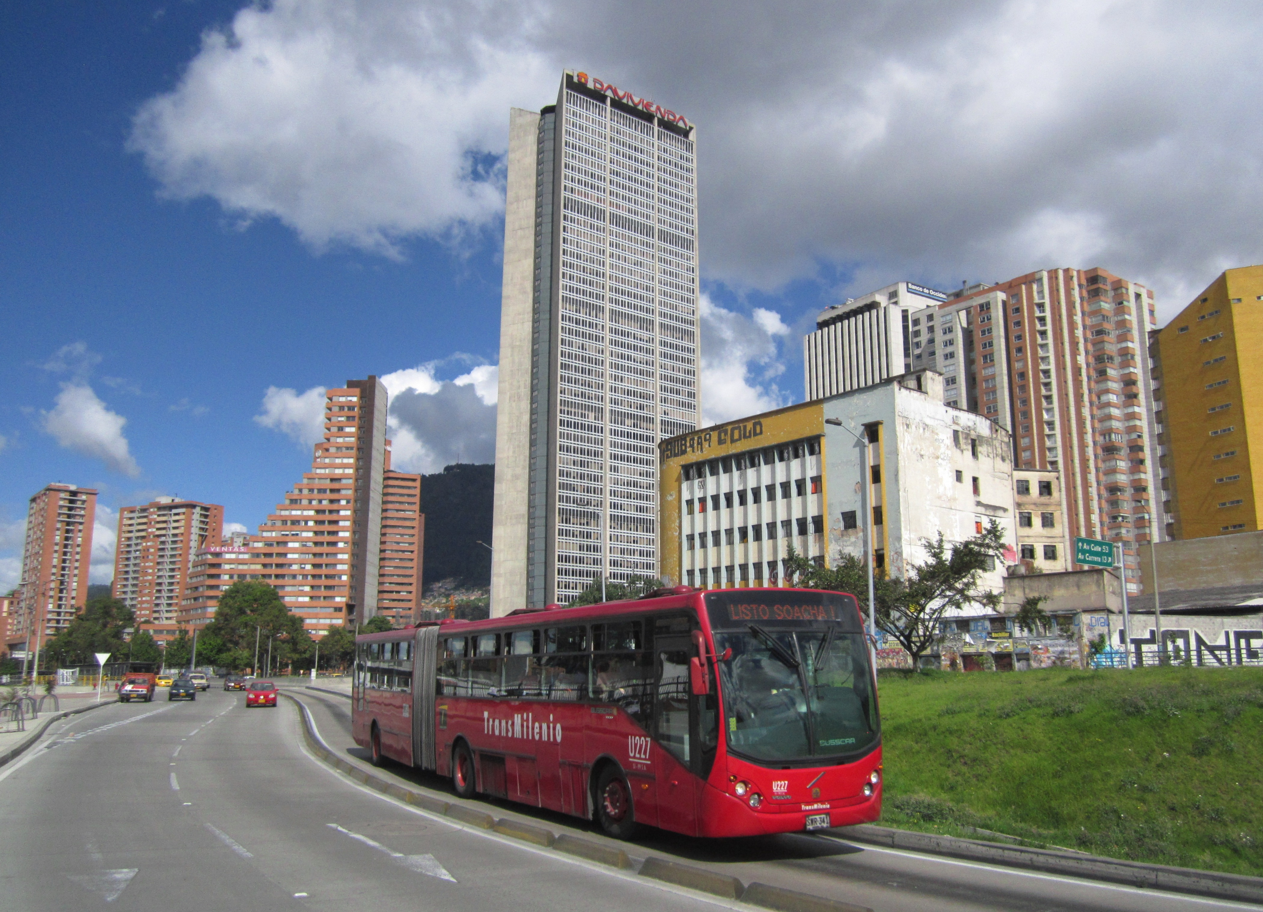 Bus de TransMilenio en la avenida Caracas con calle 24 en el centro de Bogotá.